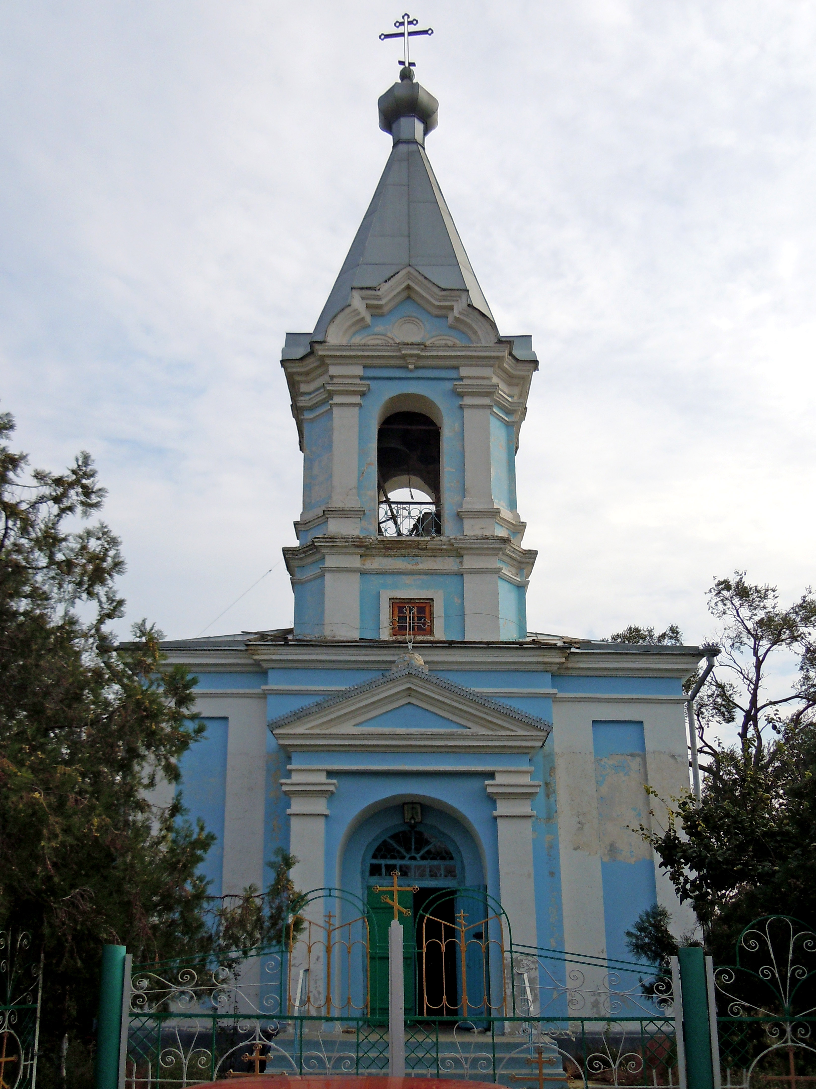 Церква Св. Михаїла, с. Спаське